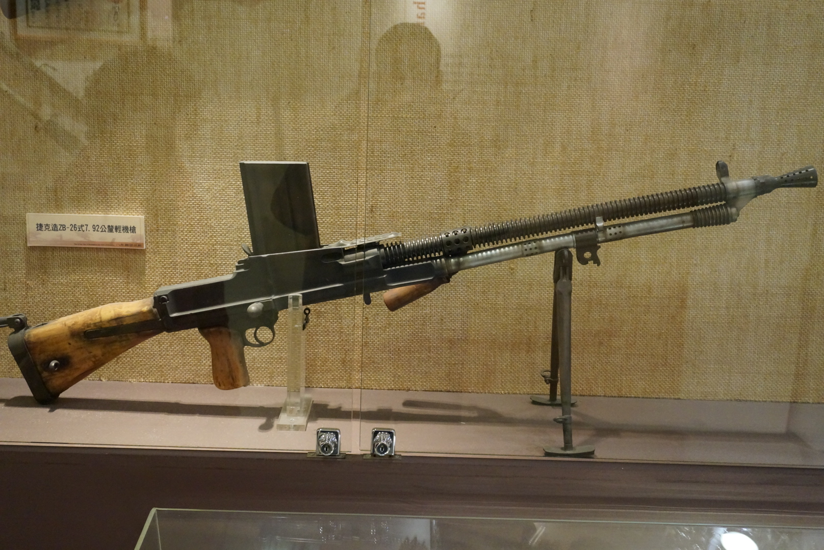 國軍歷史文物館展示的捷克造ZB-26式輕機槍。